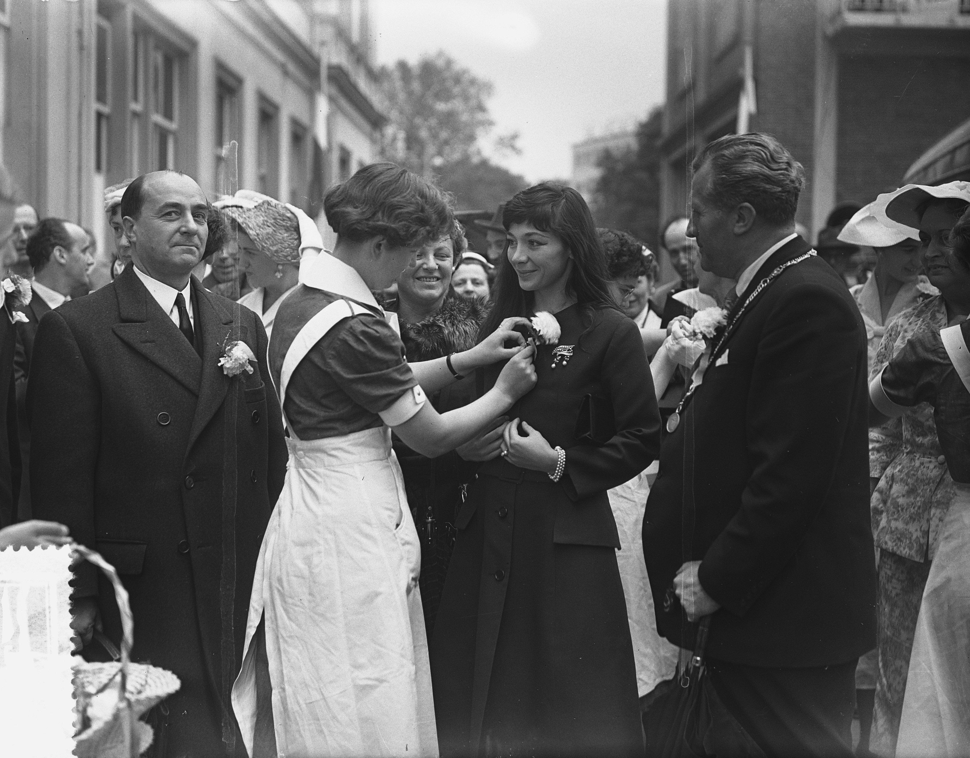 Collectie / Archief : Fotocollectie Anefo Reportage / Serie : [ onbekend ] Beschrijving : Franse chansonniere Juliette Greco te Arnhem i.v.m. evenement Eutopia, rechts burgemeester Matser Datum : 15 juni 1955 Locatie : Arnhem, Gelderland Trefwoorden : burgemeesters, decoraties, muziek, verpleegsters, zangeressen Persoonsnaam : Greco, Juliette, Matser, Chr.G. Fotograaf : Bilsen, Joop van / Anefo Auteursrechthebbende : Nationaal Archief Materiaalsoort : Glasnegatief Nummer archiefinventaris : bekijk toegang 2.24.01.09 Bestanddeelnummer : 907-1840